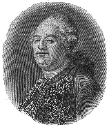 Louis XVI (1754-1793)